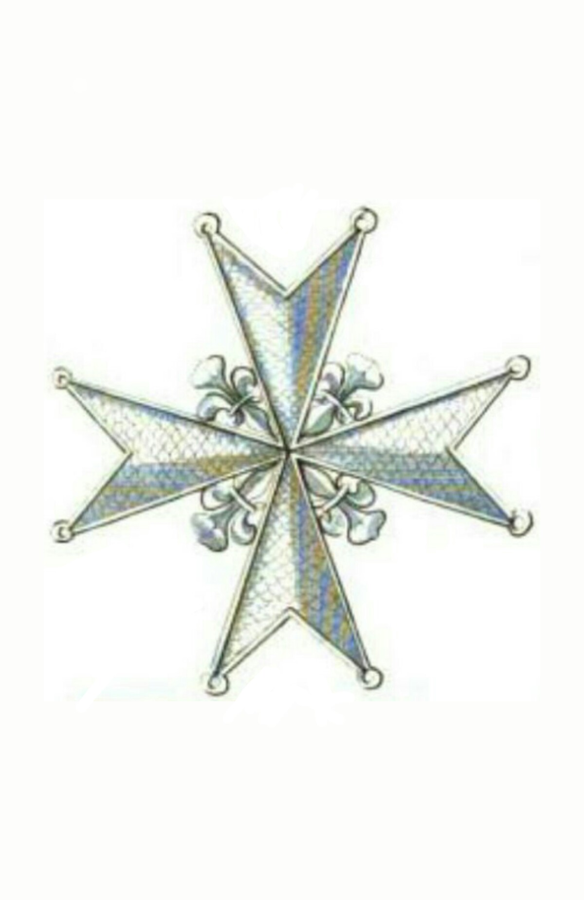 Gwiazda Orderu Świętego Stefana (Toskania)